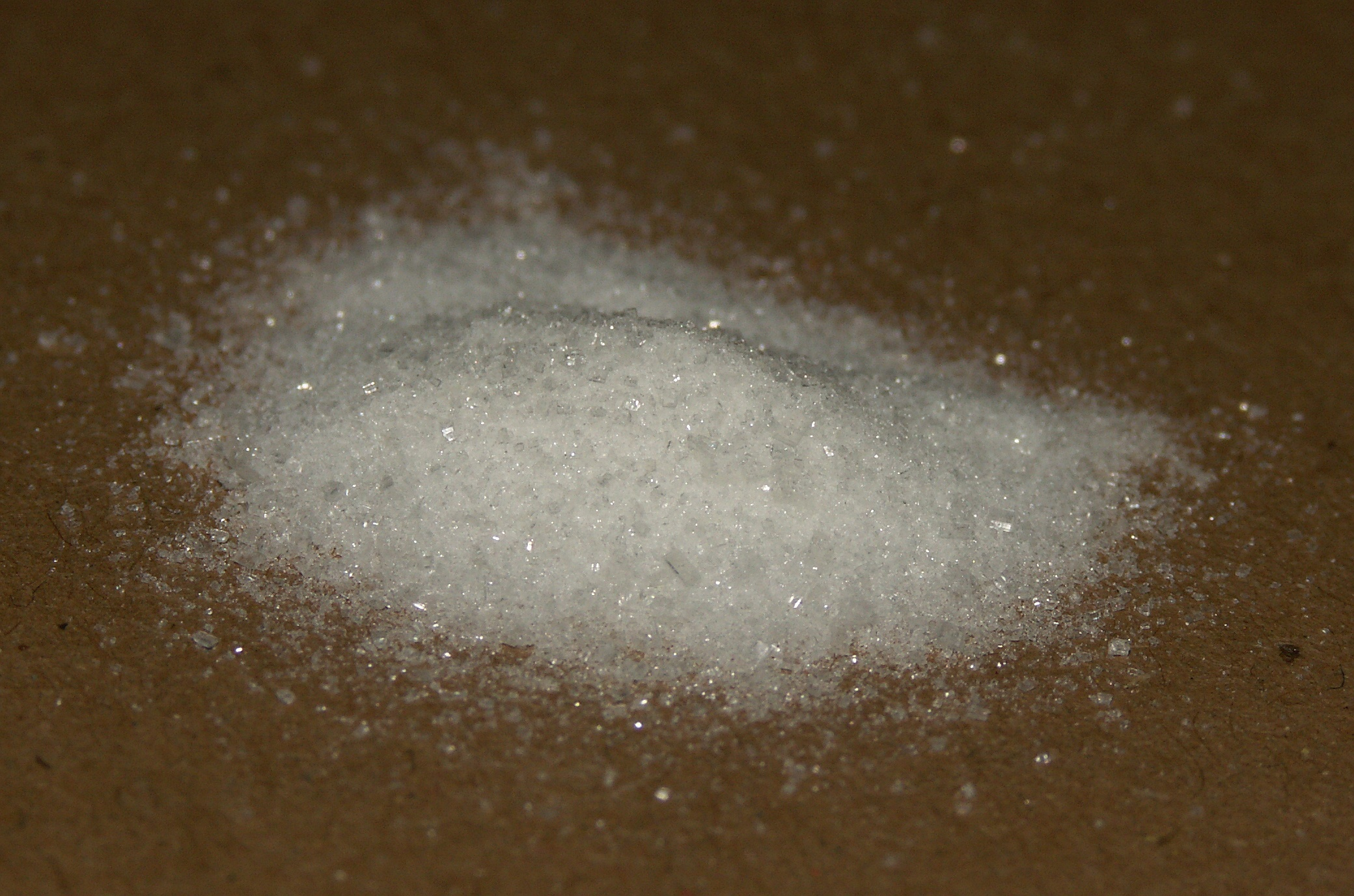 Ascorbinsäure, kristallin